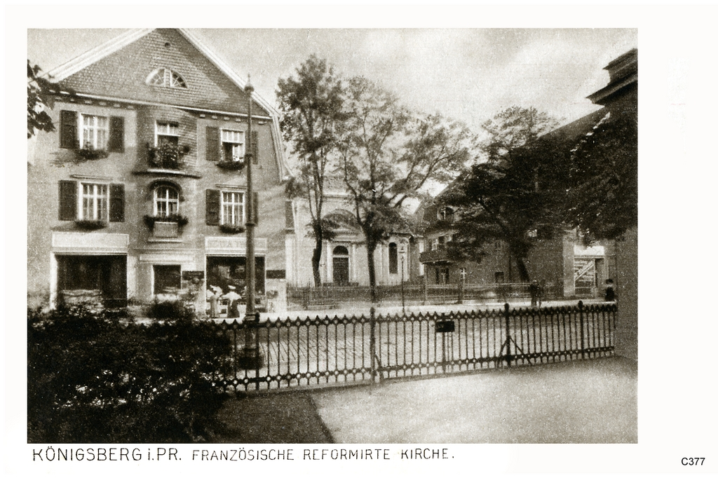 Französisch Refomierte Kirche in Königsberg